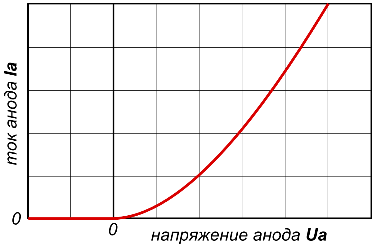 Закон степени трёх вторых - идеализированная форма